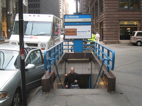 Entrée de Monroe sur la bleue